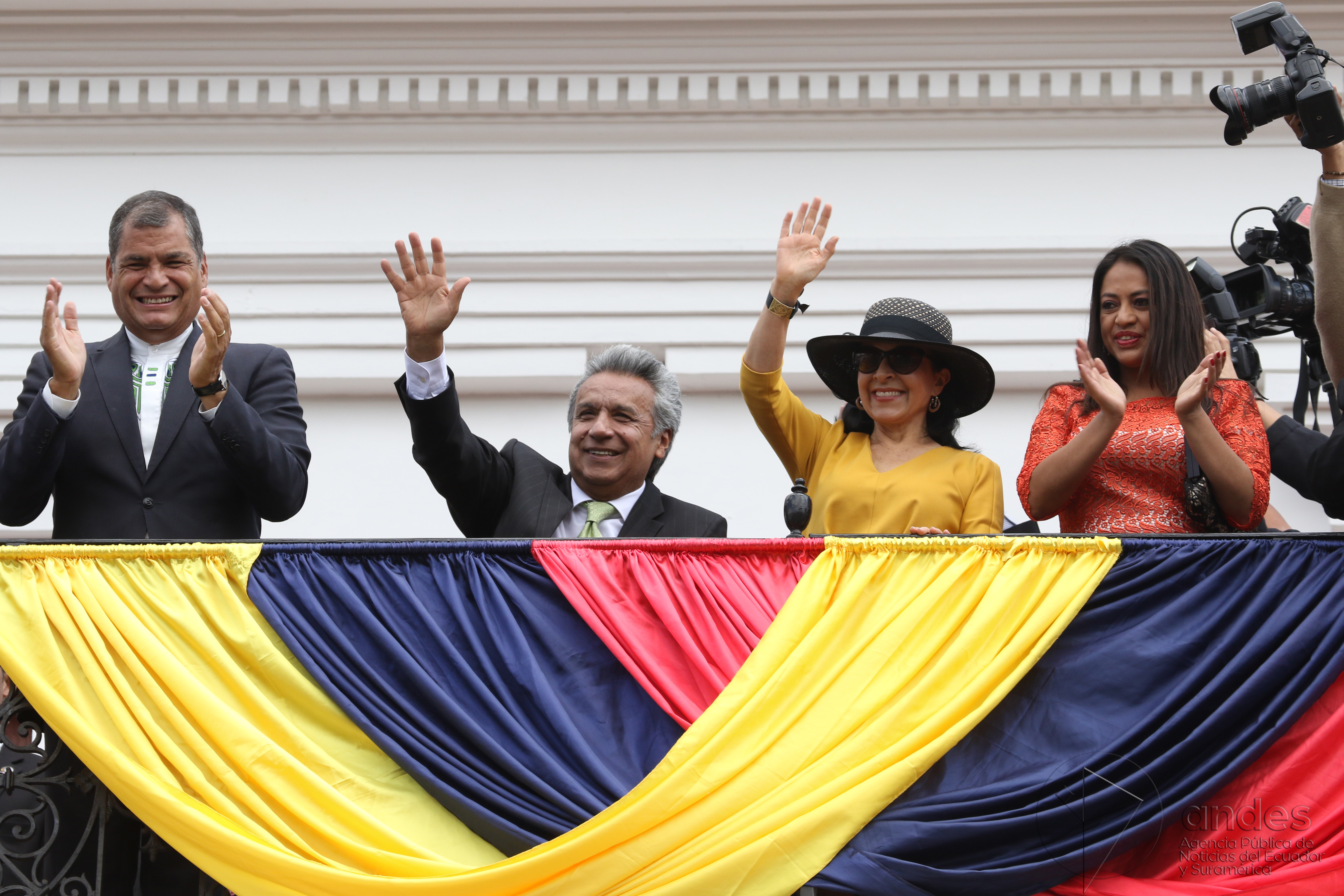 Quito, 3 abr (Andes).- Un día después de su triunfo en las urnas, el presidente electo Lenín Moreno participó en el cambio de guardia presidencial en el Palacio de Gobierno, una ceremonia tradicional que convocó a cientos de ecuatorianos que vitorearon a los nuevos mandatarios y al presidente saliente, Rafael Correa. ANDES/Micaela Ayala V.